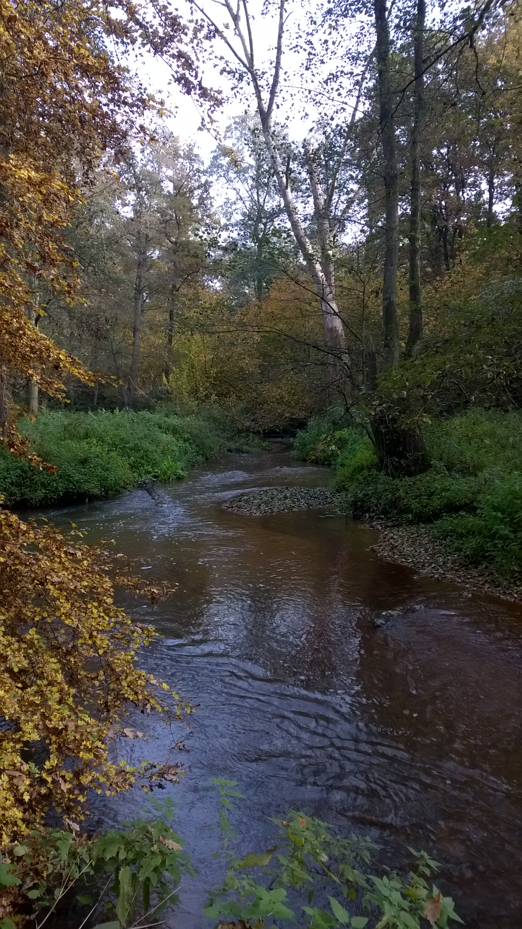 Foto van het Geldersch Nierskanaal in Nationaal park De Maasduinen. Door de tijd is het kanaal veranderd in een natuurlijk beekje uitgesleten in rivierduinen met begroeide oevers.